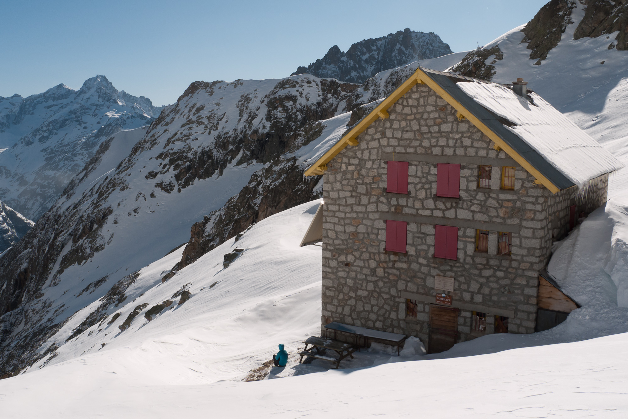 Il Refuge de Soreiller - Massiccio des Écrins